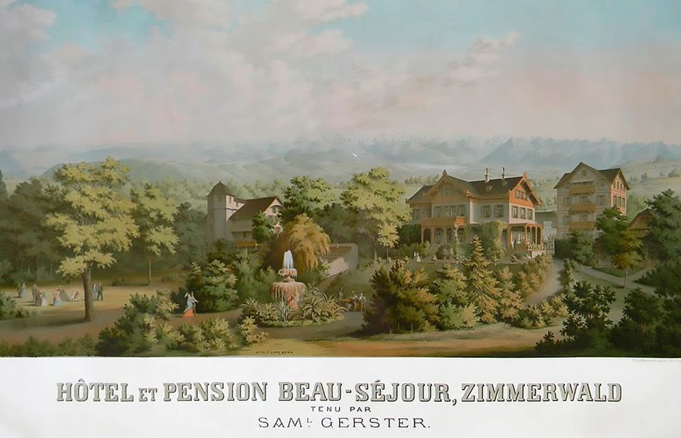 Farblithographie des «Hôtel Beau-Séjour» in der Mitte, rechts das Gästehaus (Pension), die spätere «Pension Schenk» und links das «Schlösschen Zimmerwald» in Zimmerwald. Gemeindearchiv Zimmerwald.